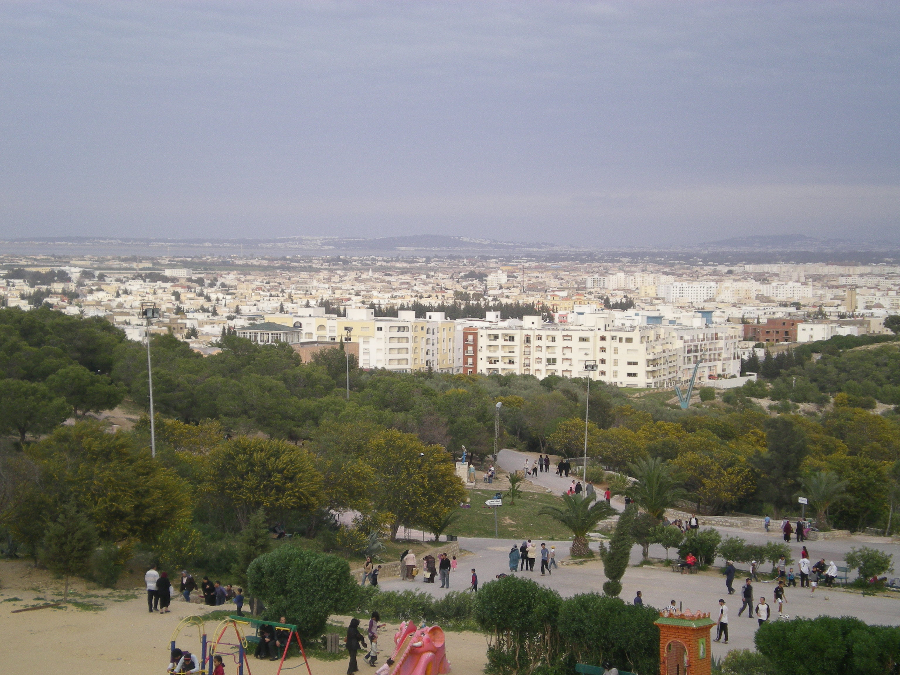 Vue de la cité Riadh El Andalous et El Ghazala (gouvernorat de l'ariana) à partir du parc d'Ennahli qui est situé sur la colline de l'Ariana sur une superficie de 130 hectares. Ce parc urbain (l'un des 4 grand parcs déjà installés dans le Grand-Tunis) est dédié à la détente et aux loisirs. Les 2 collines, au fond de la photo, sont celle de Gammarth à gauche et celle de Sidi Bou Said